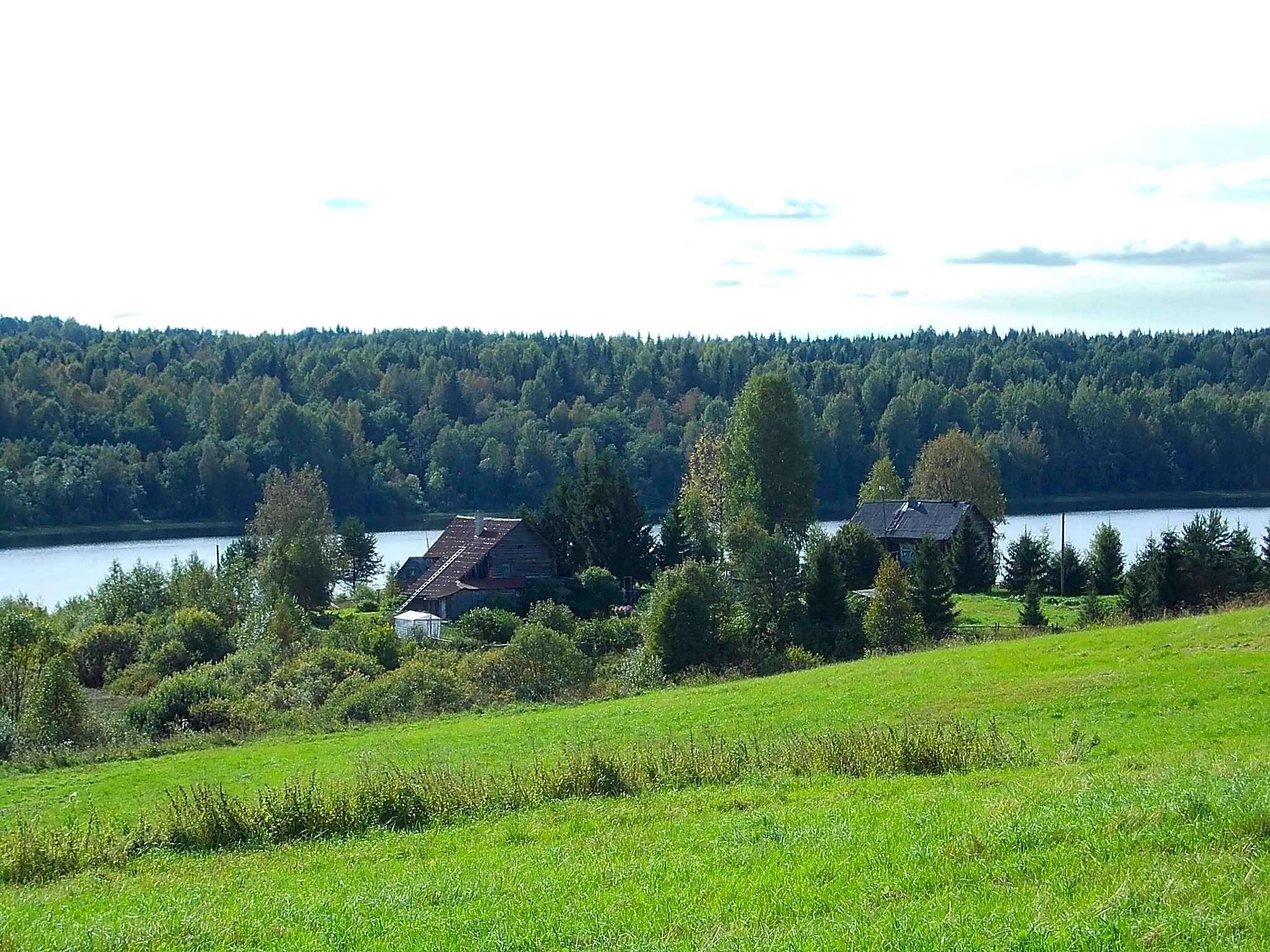 Дома в Гижино на берегу Лоянского озера